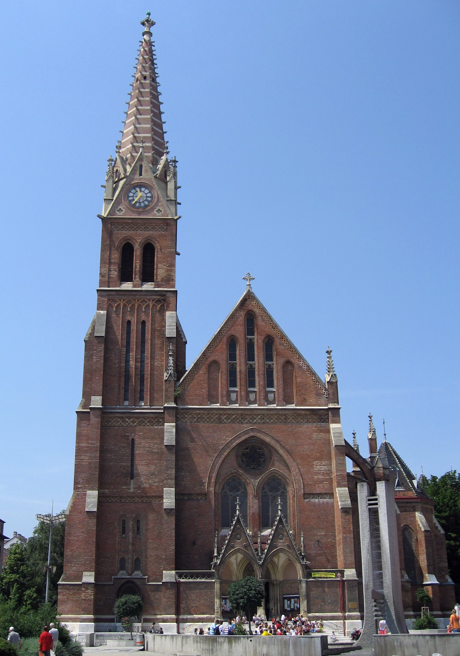 Rudolfsheimer Pfarrkirche in Wien